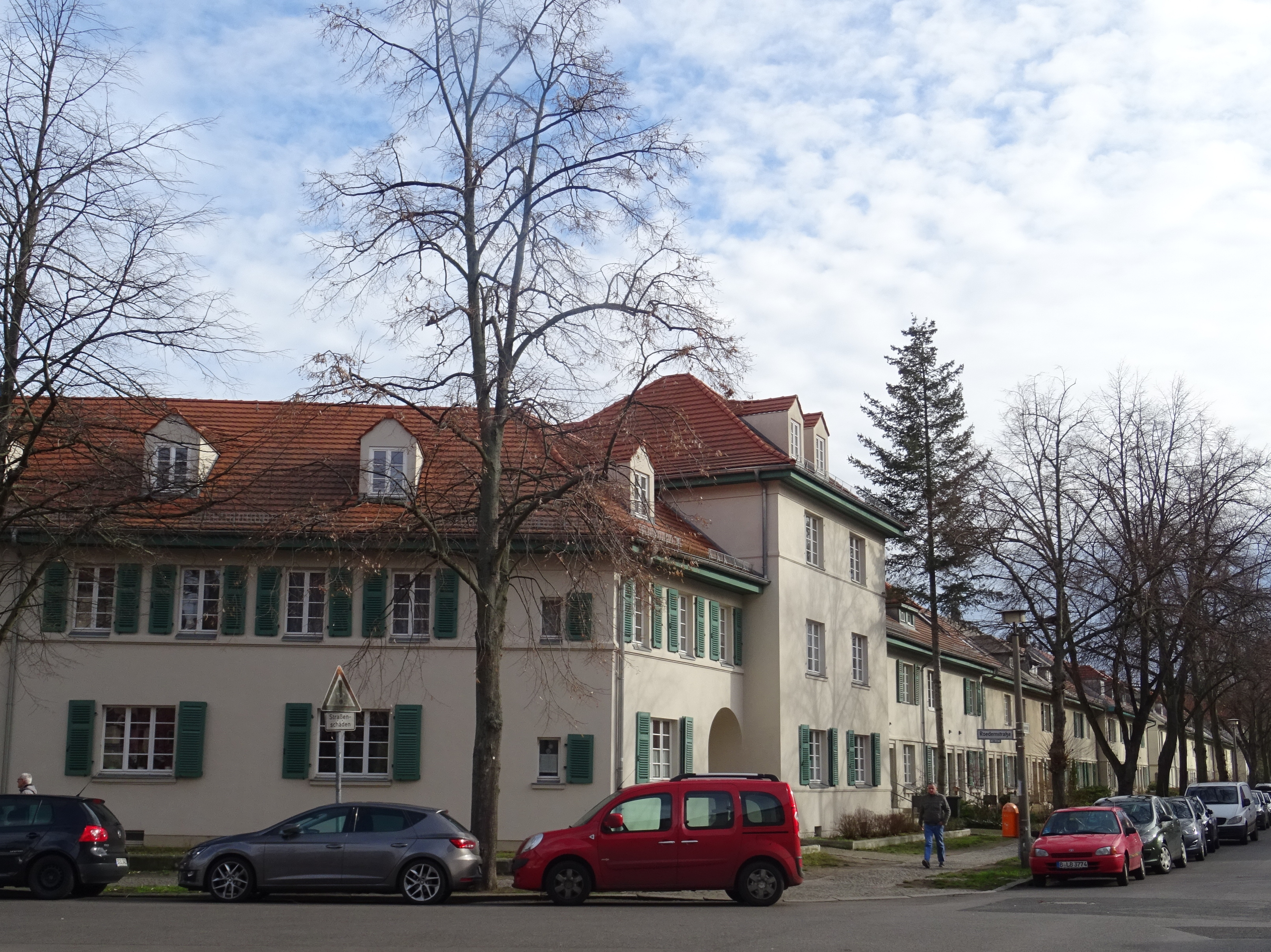 Berlin-Oberschöneweide, Siedlung Oberschöneweide von Peter Behrens u.a.,,Ecke Roedern/Zeppelinstraße